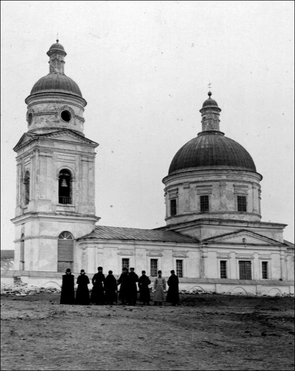 Сошествиевская церковь - Область Войска Донского, Хопёрский округ, станица Луковская.